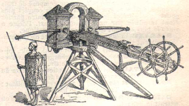 Balista.